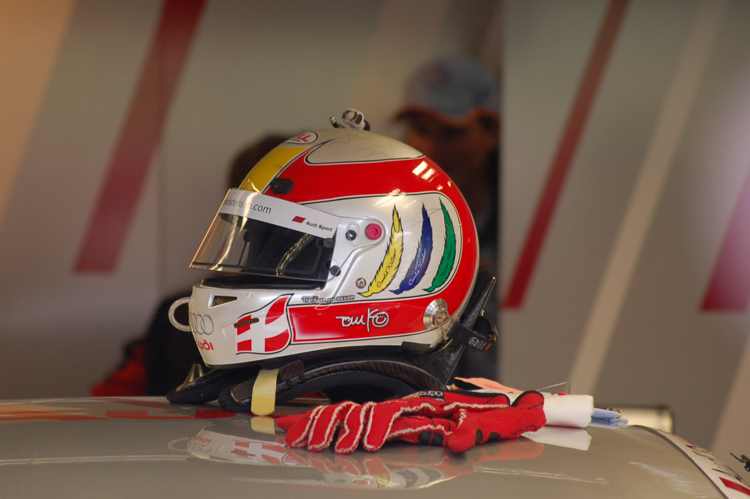 Renn-Utensilien von Tom Kristensen in Oschersleben 2008